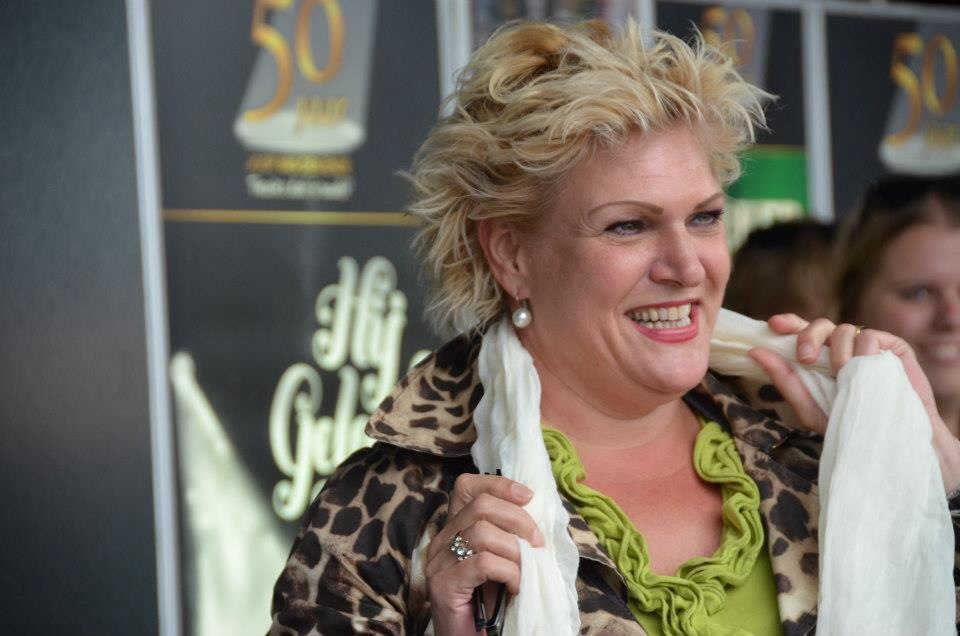 Marjolijn tijdens een signeersessie op de Uitmarkt in Amsterdam.